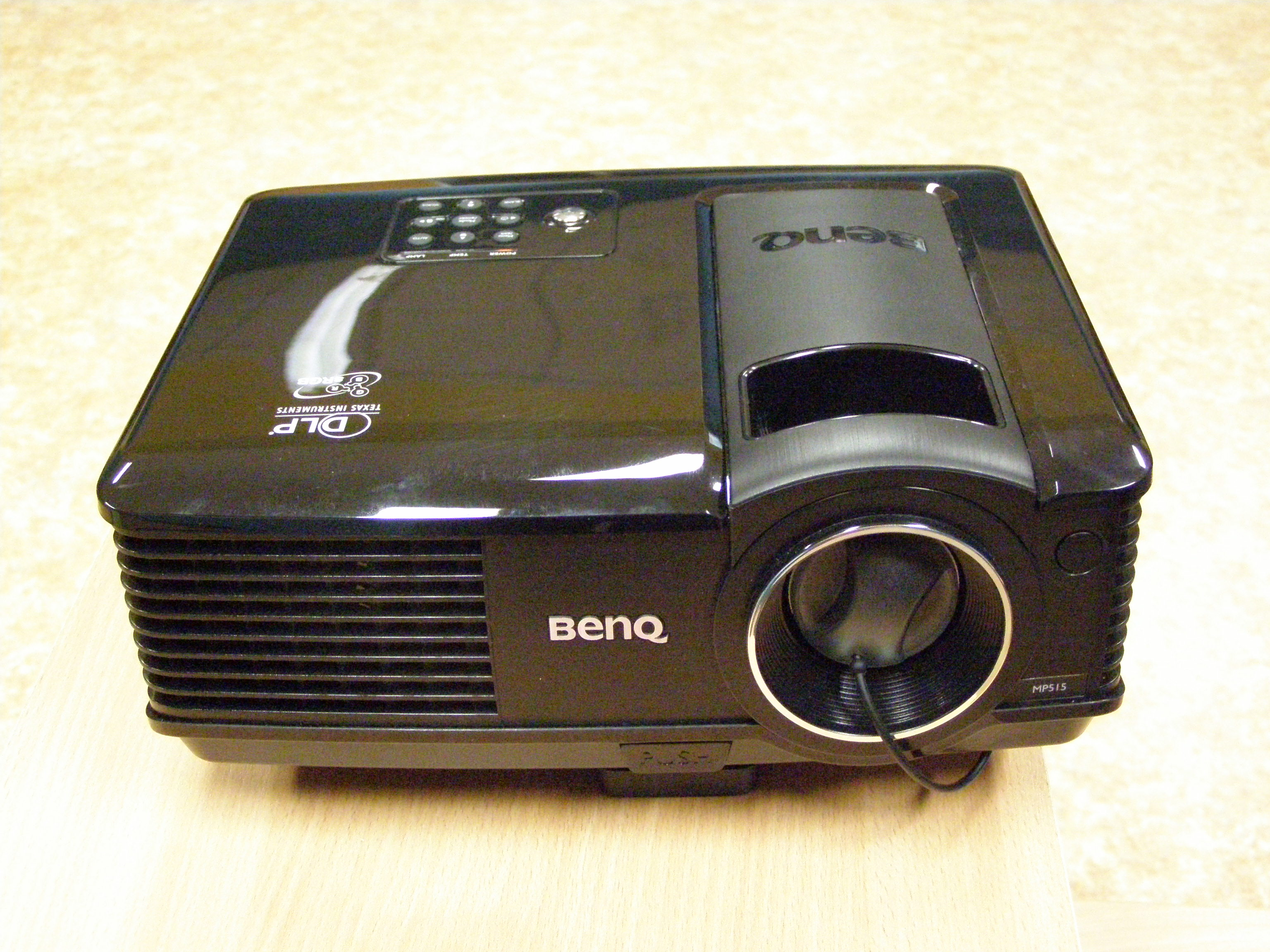 BenQ DLP-projektor MP515.